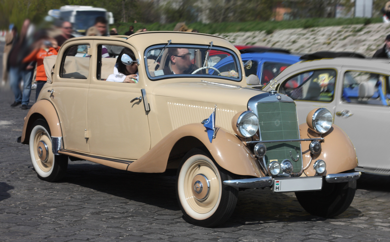 Mercedes-Benz 170V (W136) Cabriocoach